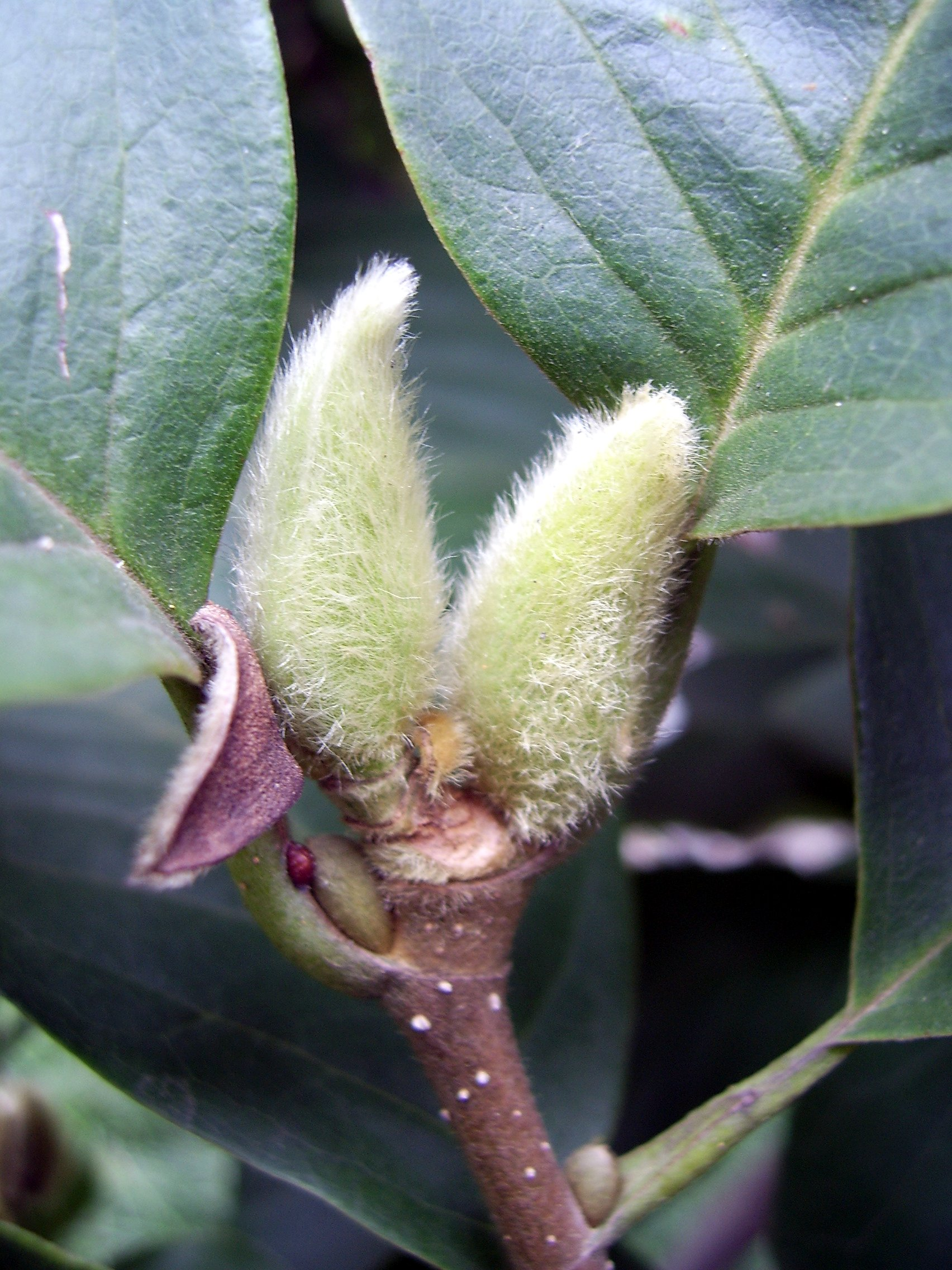 玉兰未开的花苞